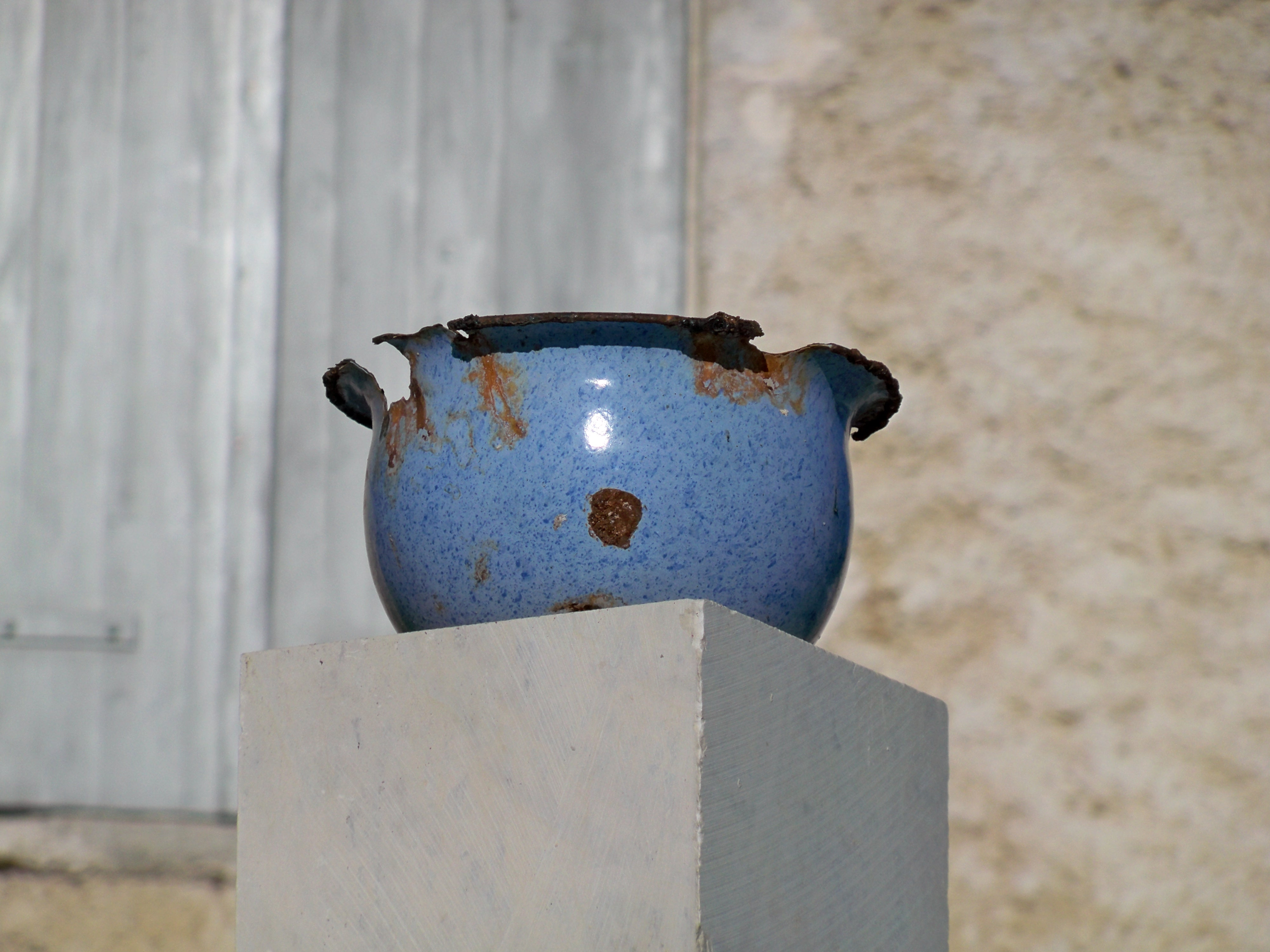 vieux pot de chambre